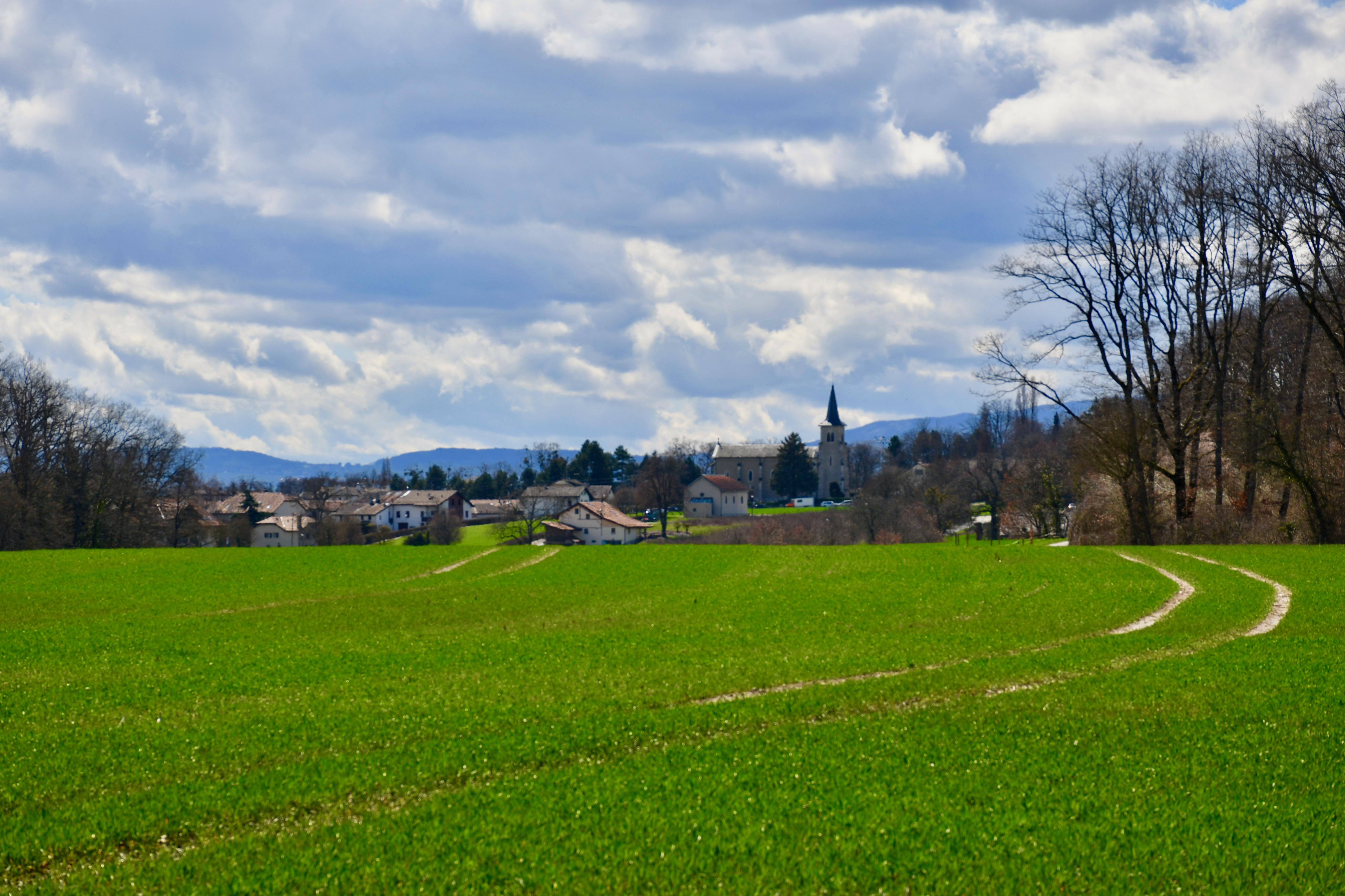 Le village de Collex dans la commune genevoise de Collex-Bossy.